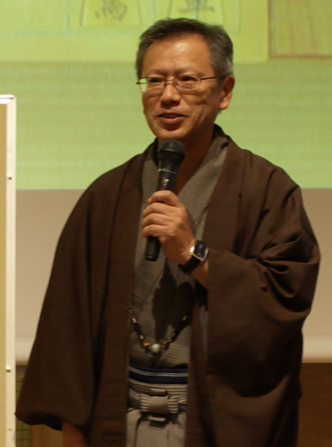 中村修九段。2018年10月2日、第66期王座戦五番勝負第3局 大盤解説会にて。